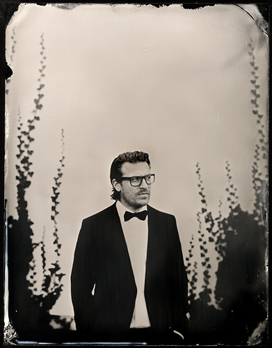 Parov Stelar photographed by Stefan Sappert